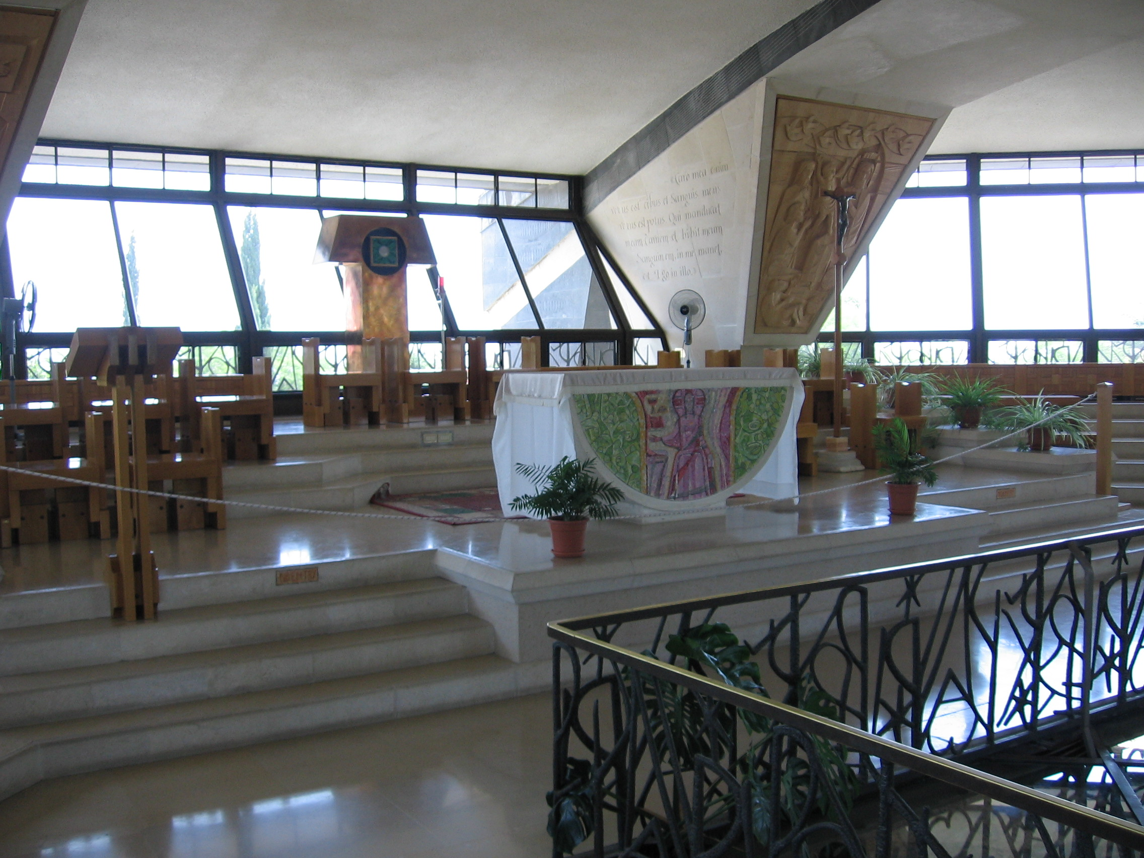 Cafarnao: la chiesa di san Pietro.